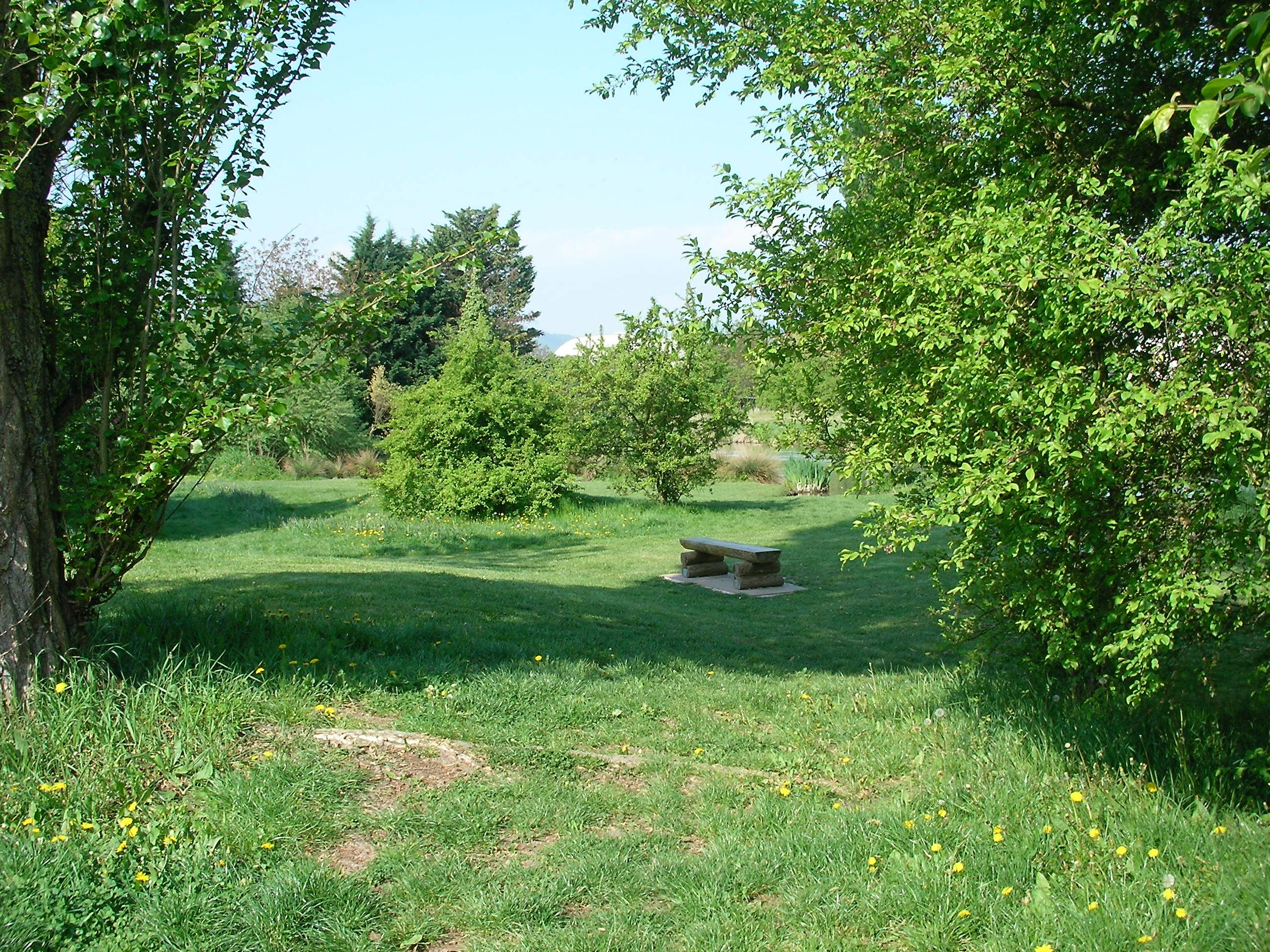 Paysage le long de la Lauch à Colmar (Haut-Rhin, France).